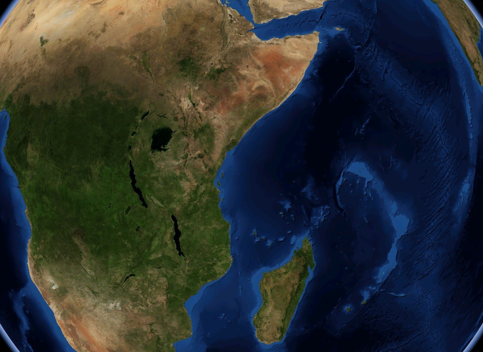 Ostafrika